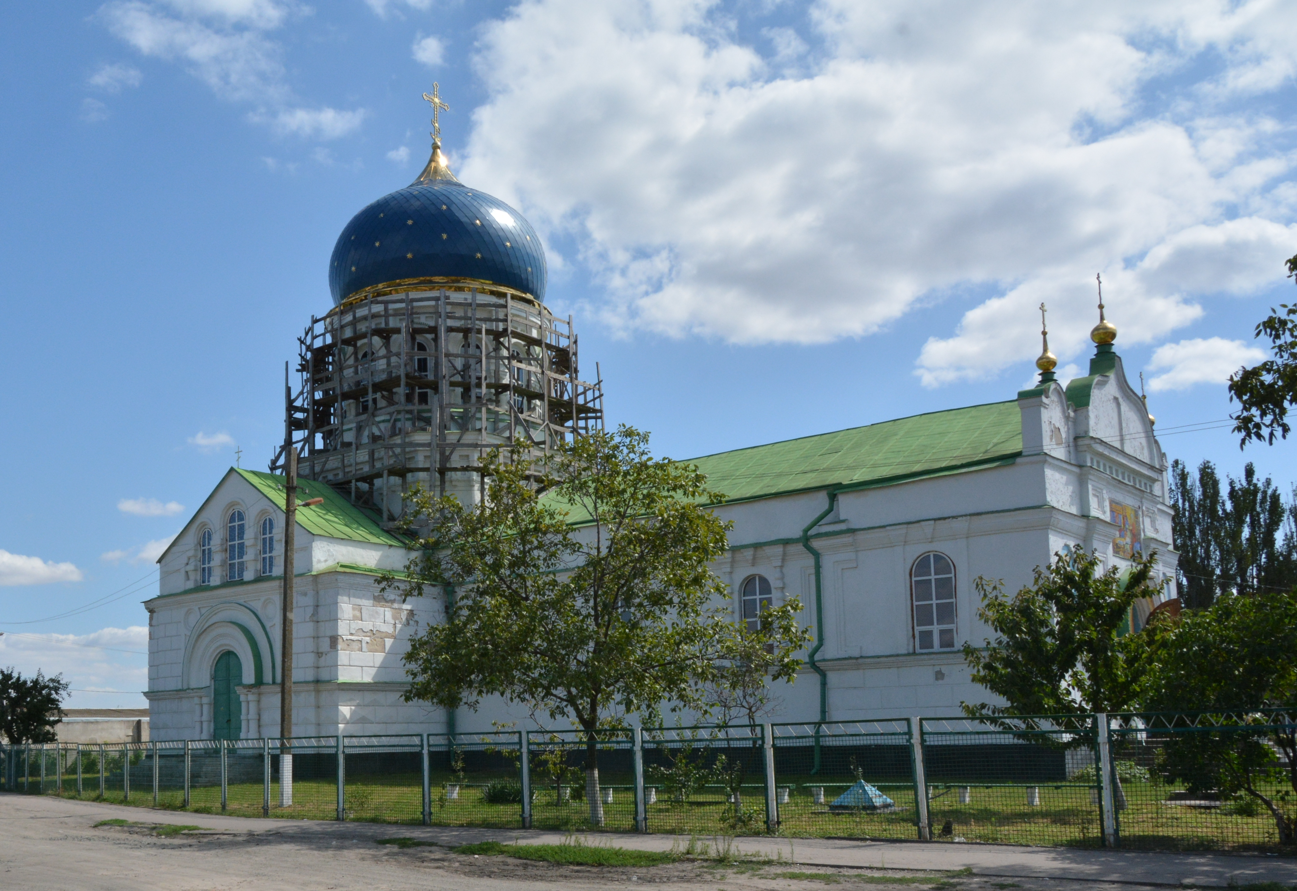 Церква Різдва Богородиці, Кам'янка-Дніпровська, вул. Смирнова, 15